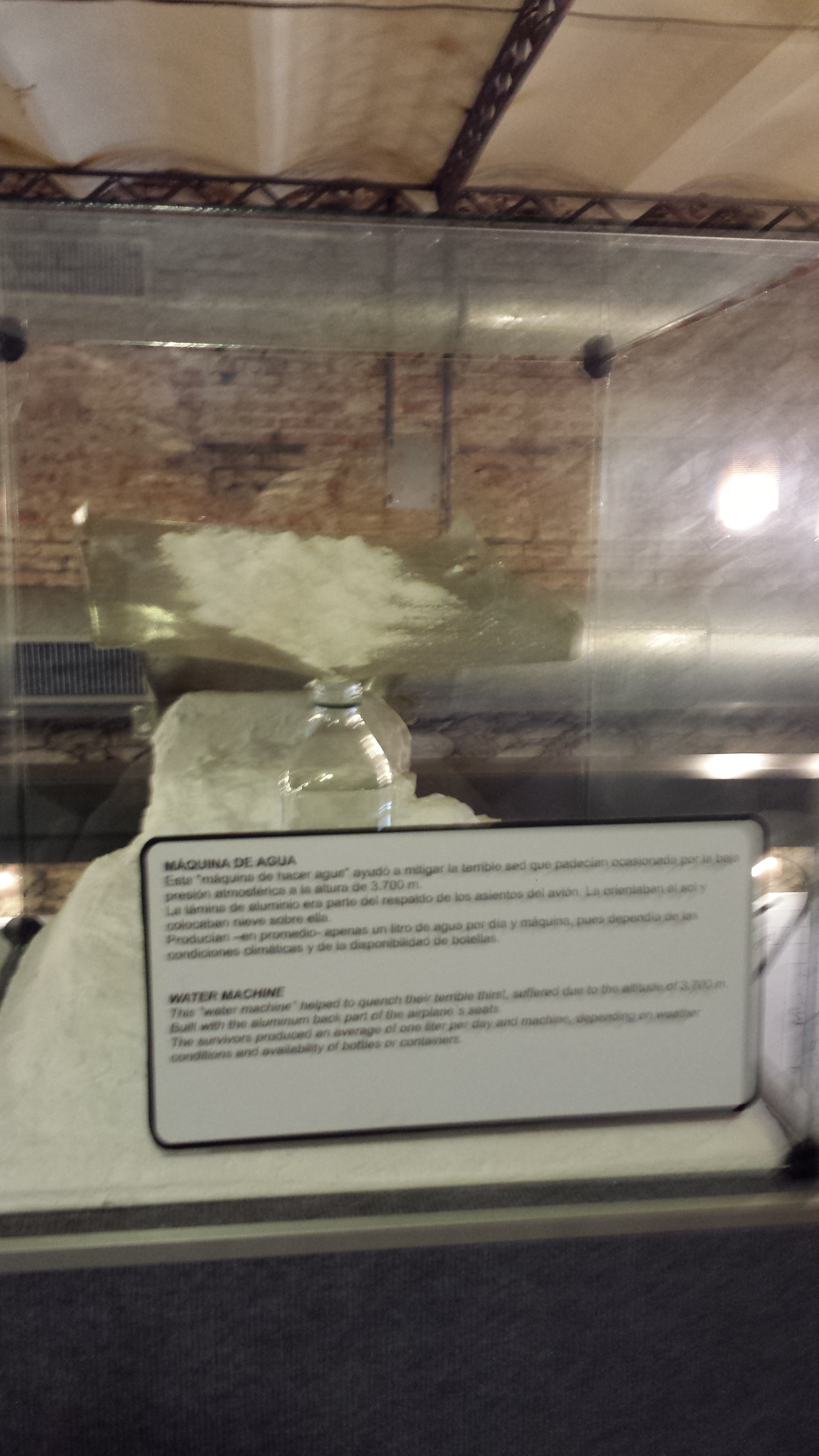 La "máquina de hacer agua" derritiendo hielo a -30º, inventada durante la tragedia de los Andes 1972.